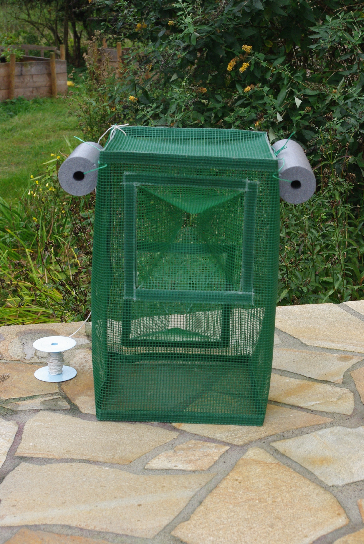 Molchreuse Typ Laar-M2. Als Schwimmreuse kann sie je nach Gewässertiefe horizontal oder vertikal eingesetzt werden.